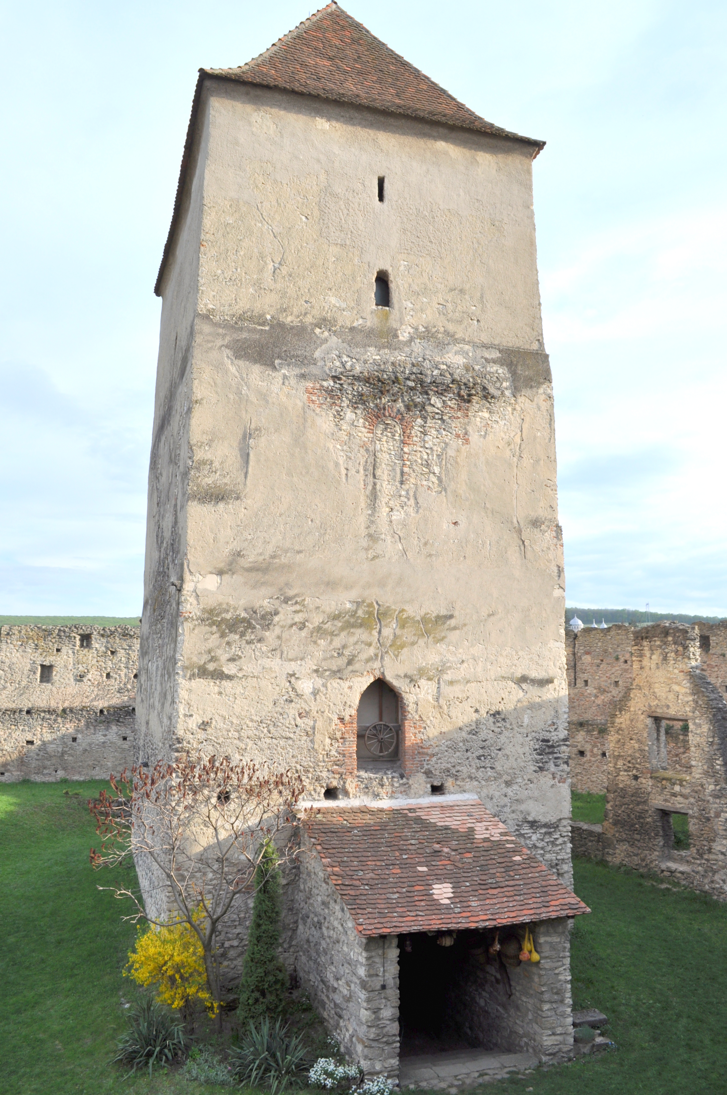 Cetatea Câlnic, județul Alba 01